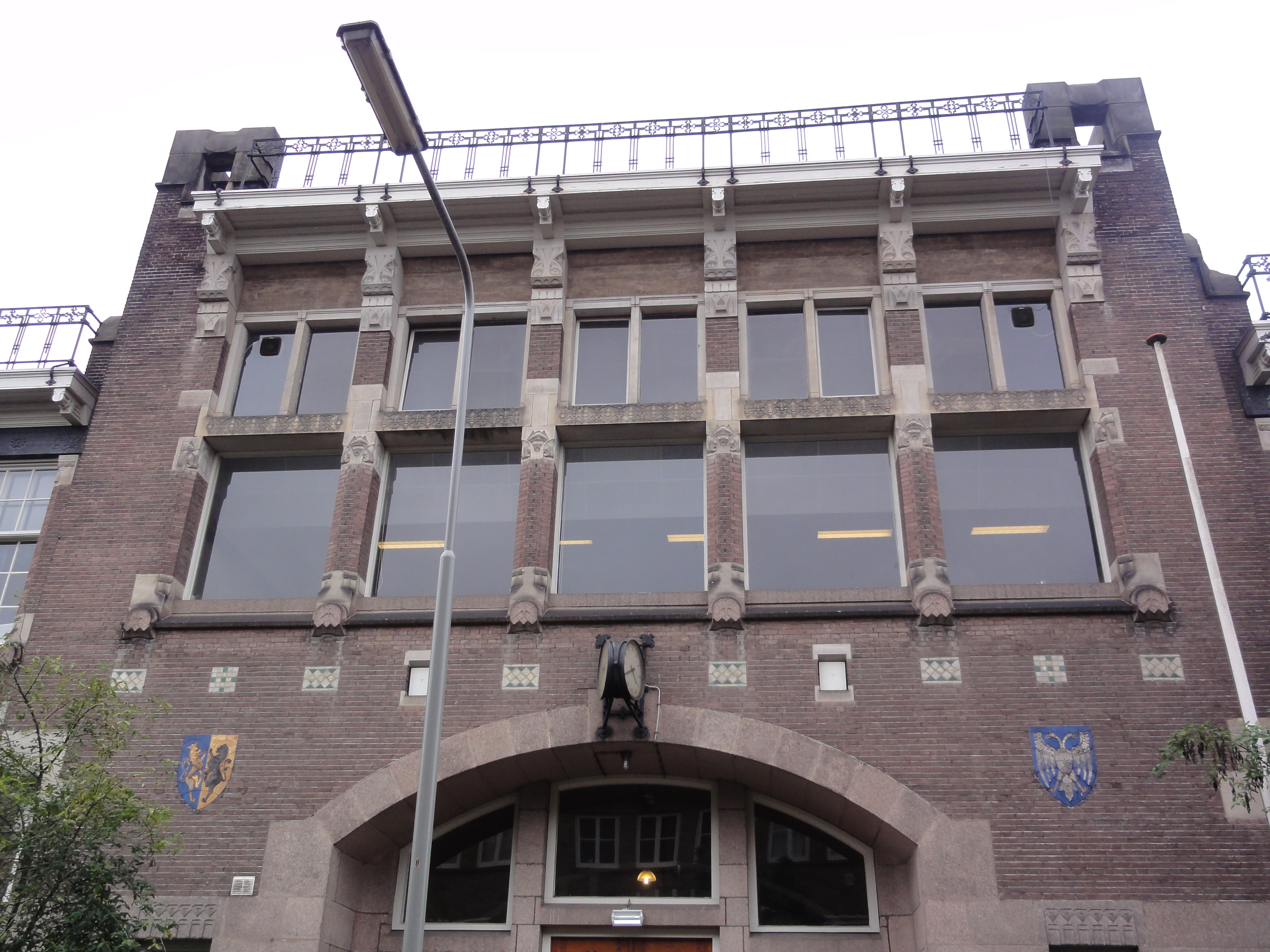 Arnhem Rijksmonument 516846 HBS Schoolstraat 33 gevel boven entree (Art Nouveau stijl)